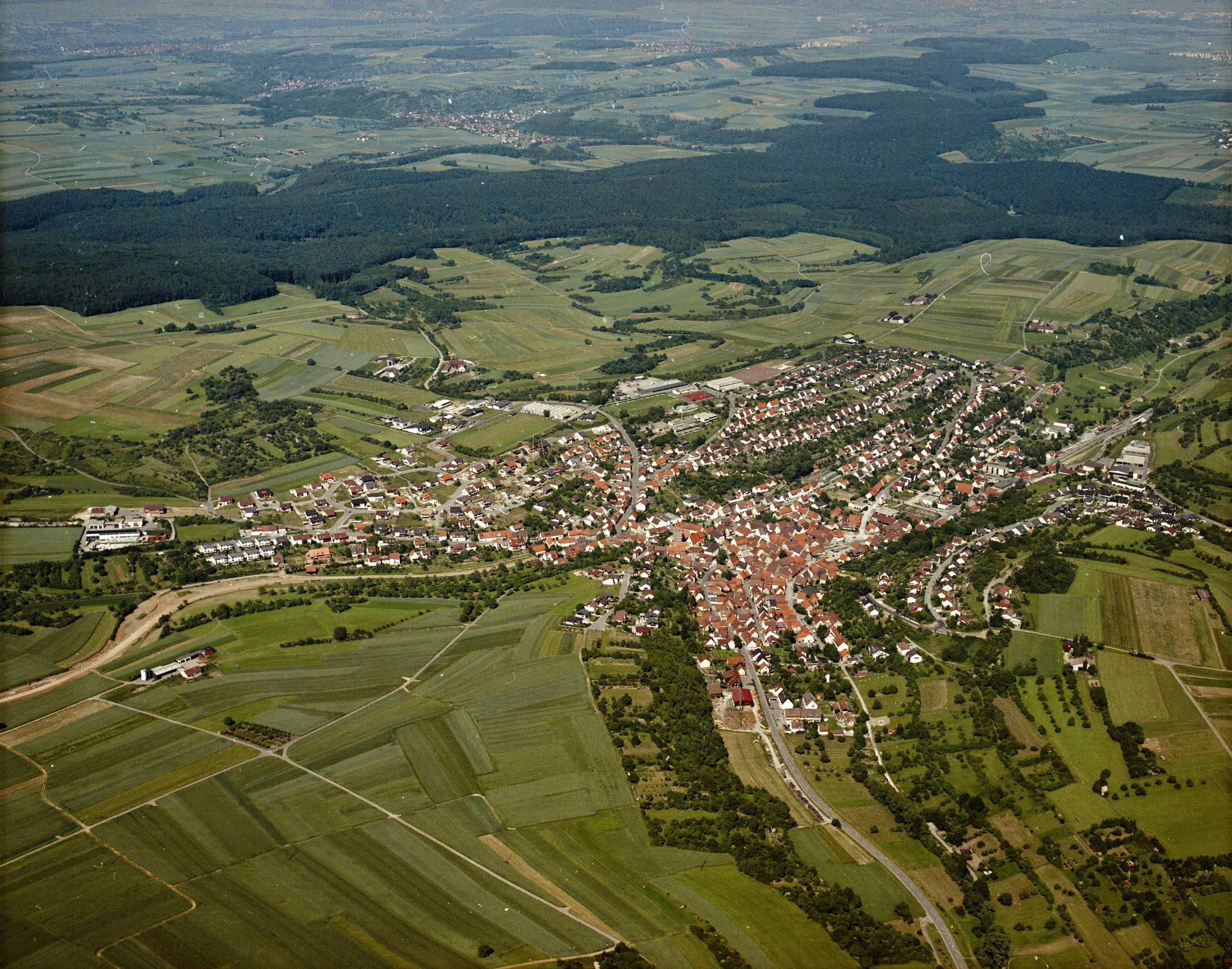 Luftbild von Weissach - Staatsarchiv Sigmaringen - Archivalieneinheit N 1/96 T 1 Nr. 510